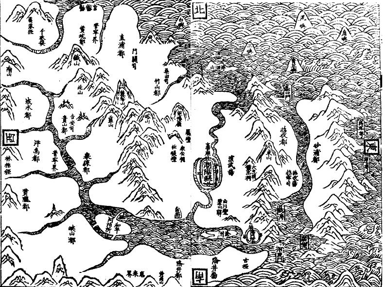 明朝潮阳疆域图，截图自明朝隆庆年间林大春所编修的《潮阳县志》。